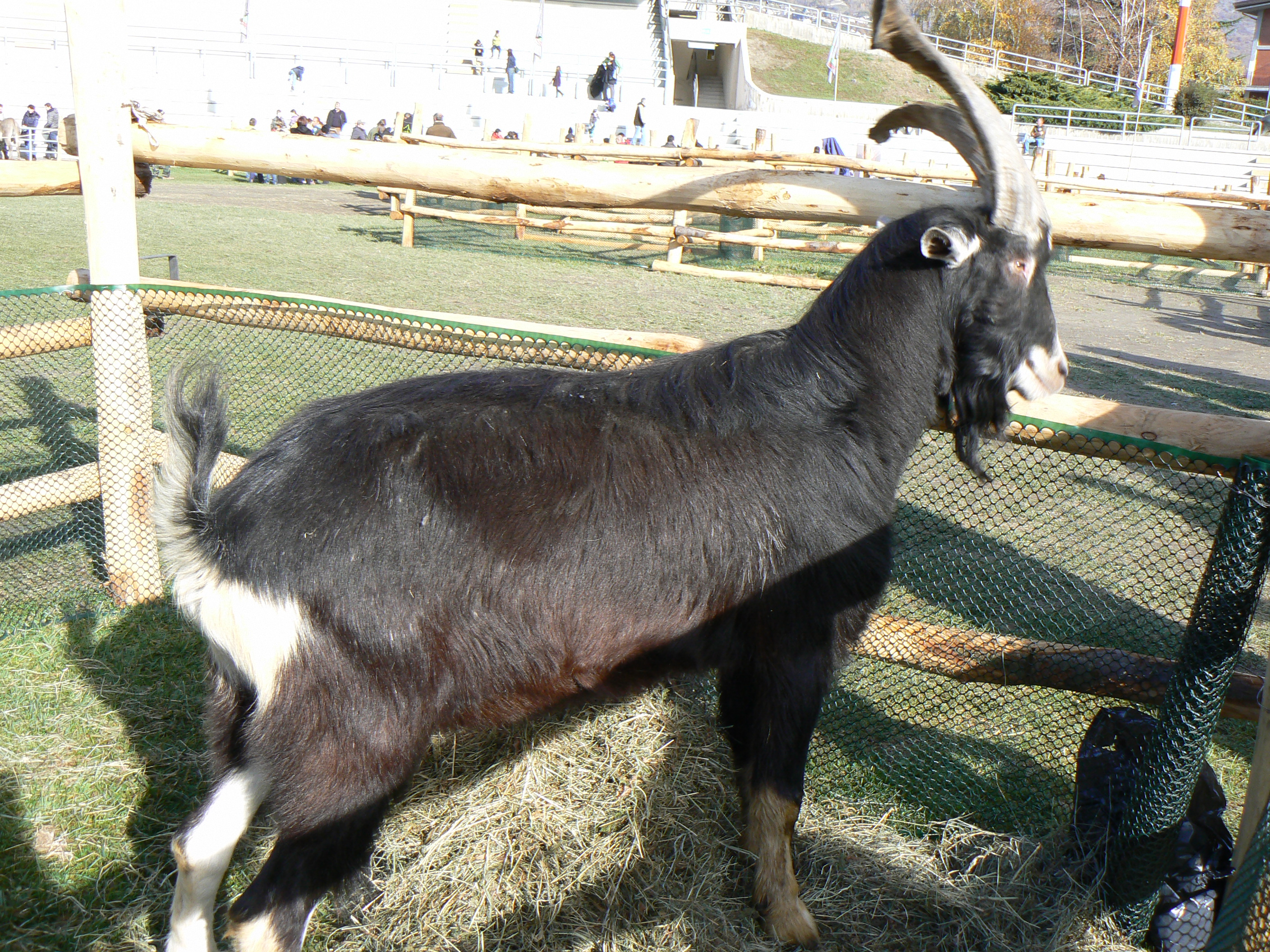 Capra Frisa Valtellinese alla Fête des Alpes 2011, ad Aosta.